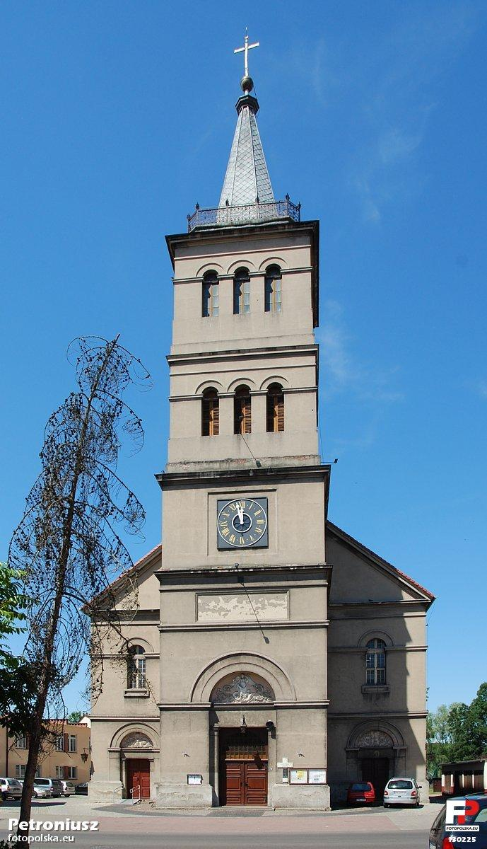 Kościół Wniebowstąpienia Pańskiego w Wolsztynie - dawny zbór ewangelicki.